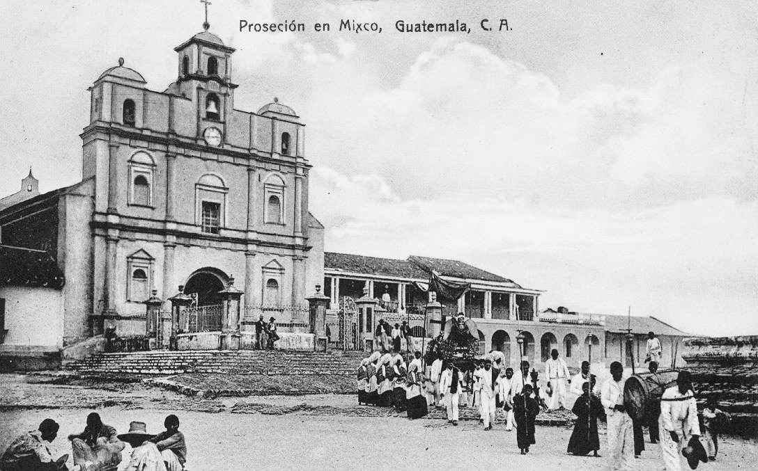 Procesión en Mixco en 1900